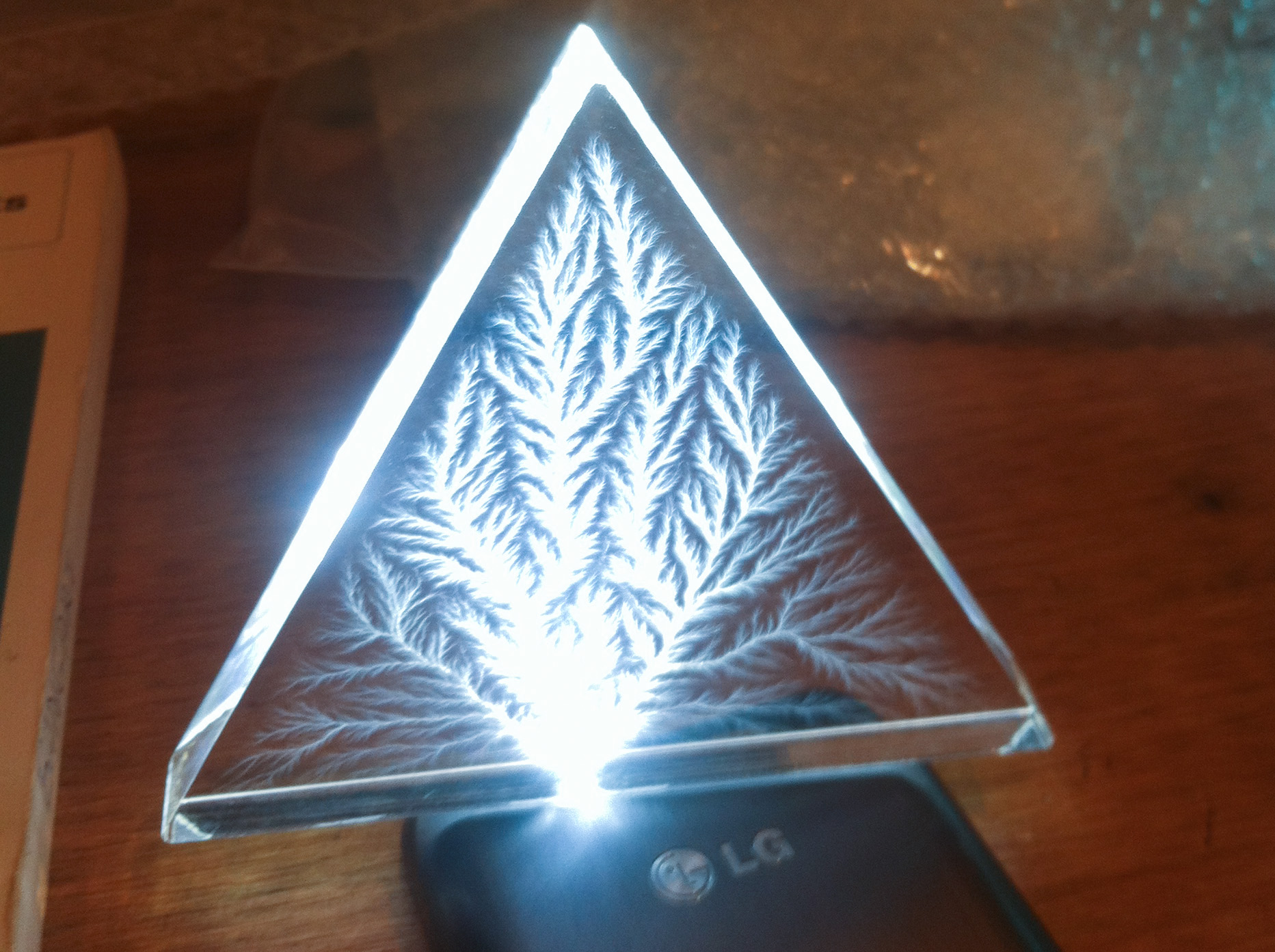 Lichtenberg figure